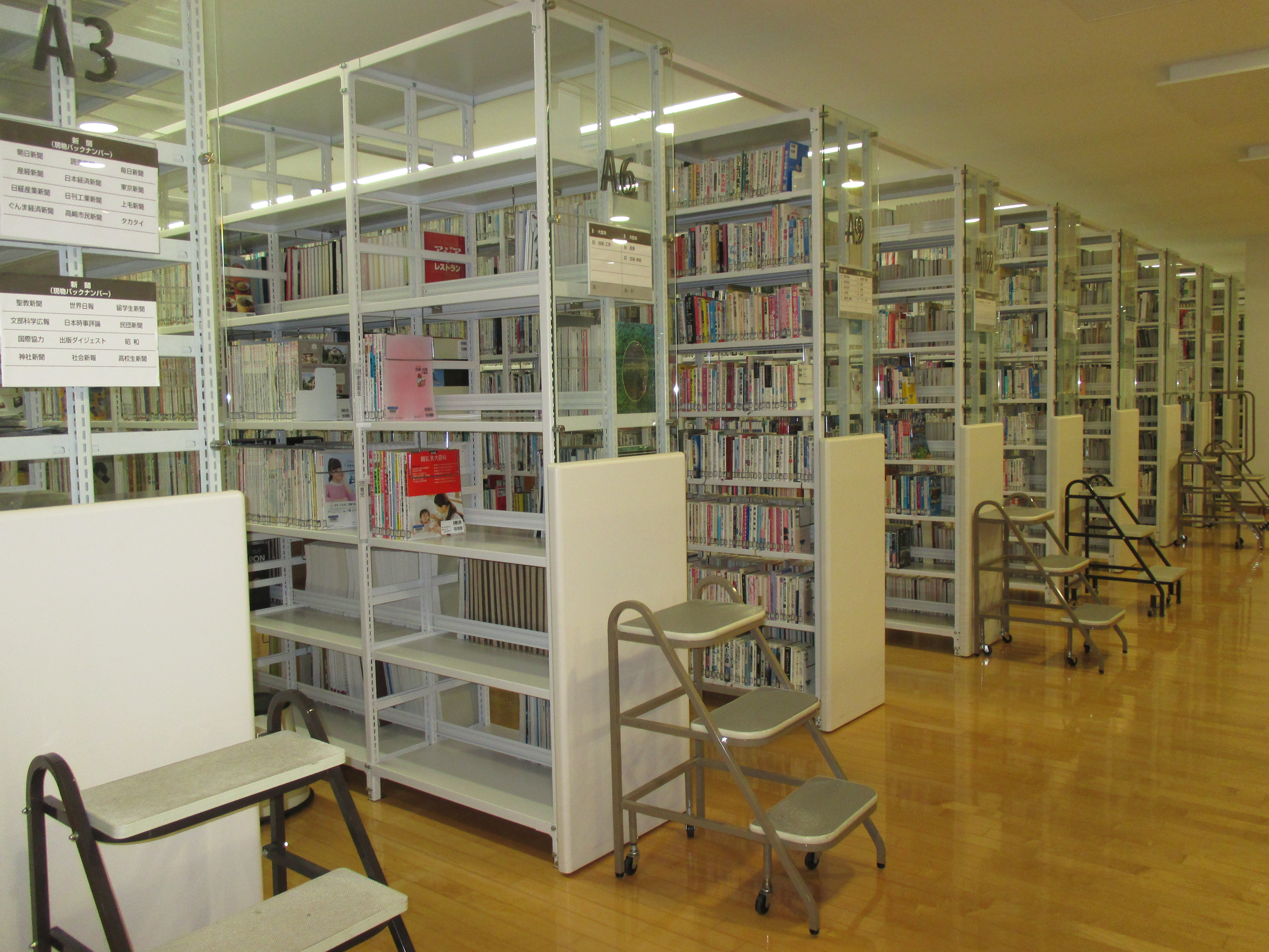 高崎市立中央図書館の公開書庫